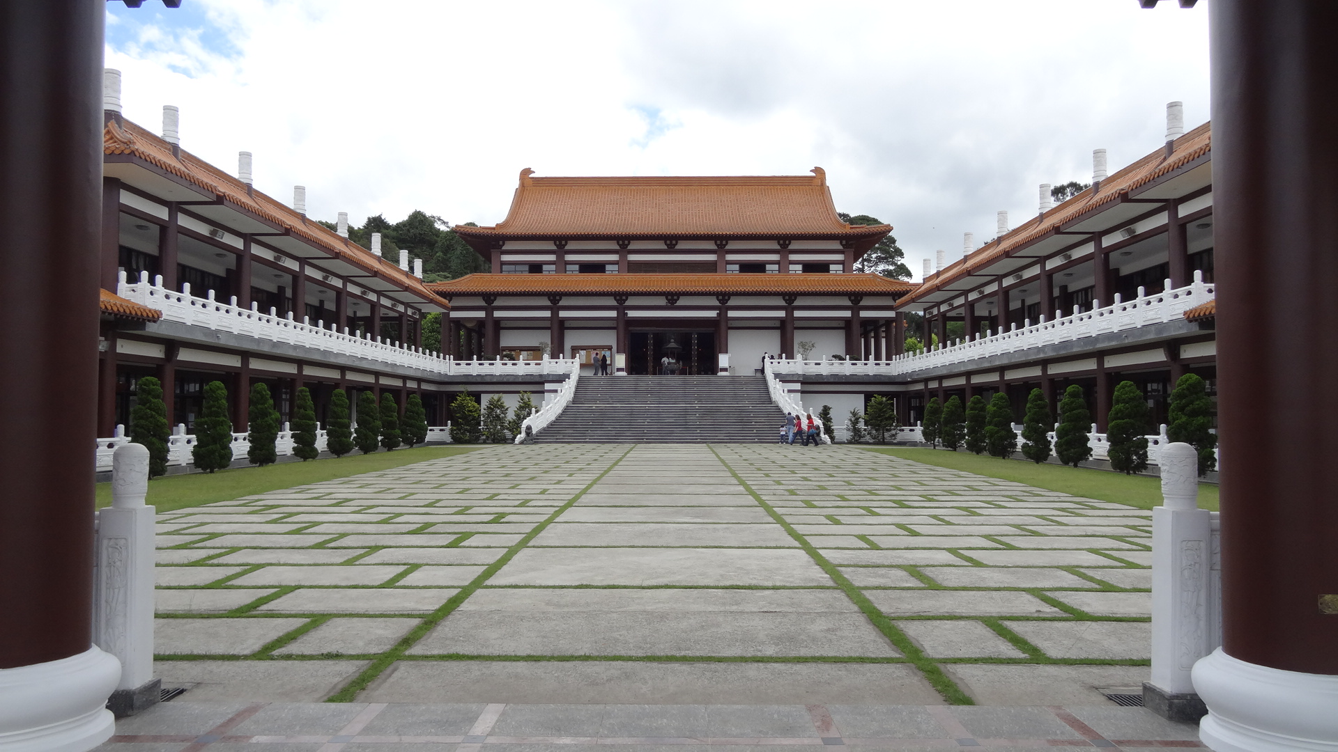 Templo Zu Lai